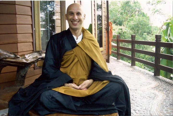 גיל אלון כמאסטר זן, בסדנה בדרום תאילנד